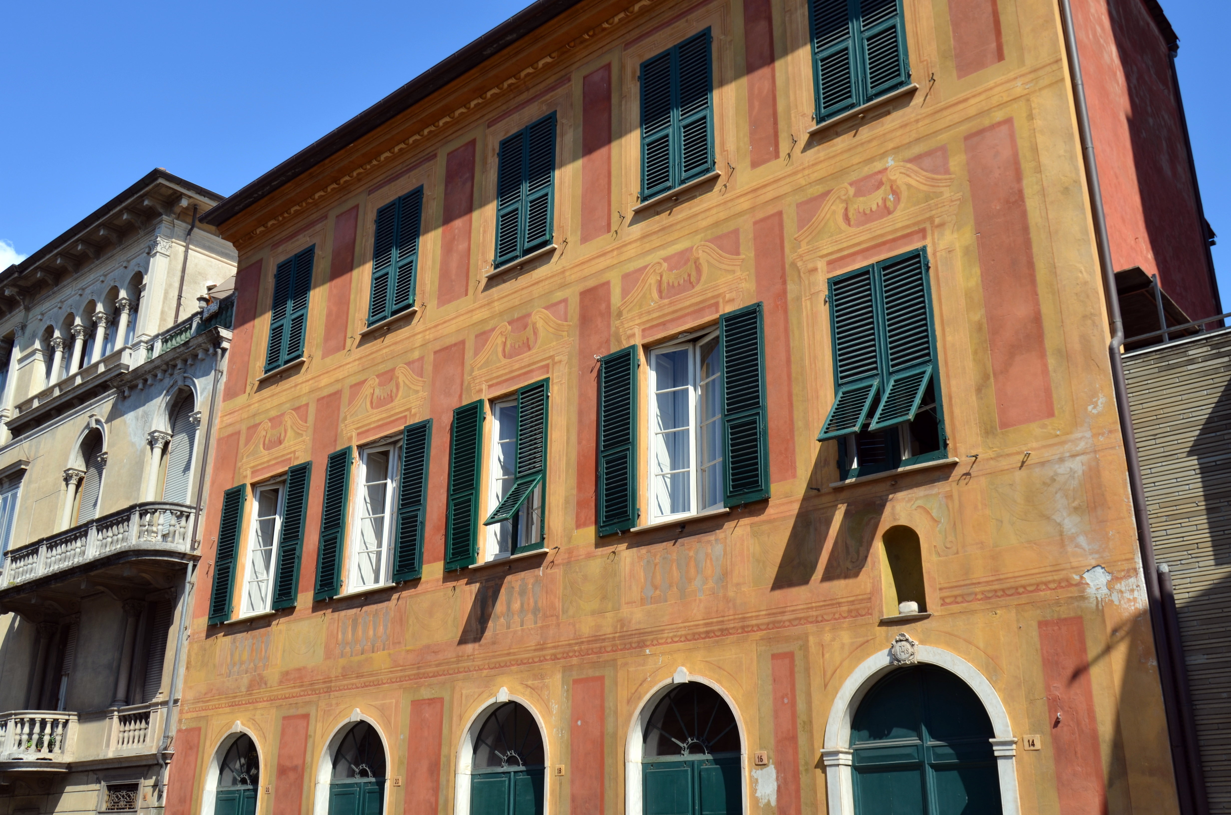 Museo-casa Carbone, Lavagna, Liguria, Italia